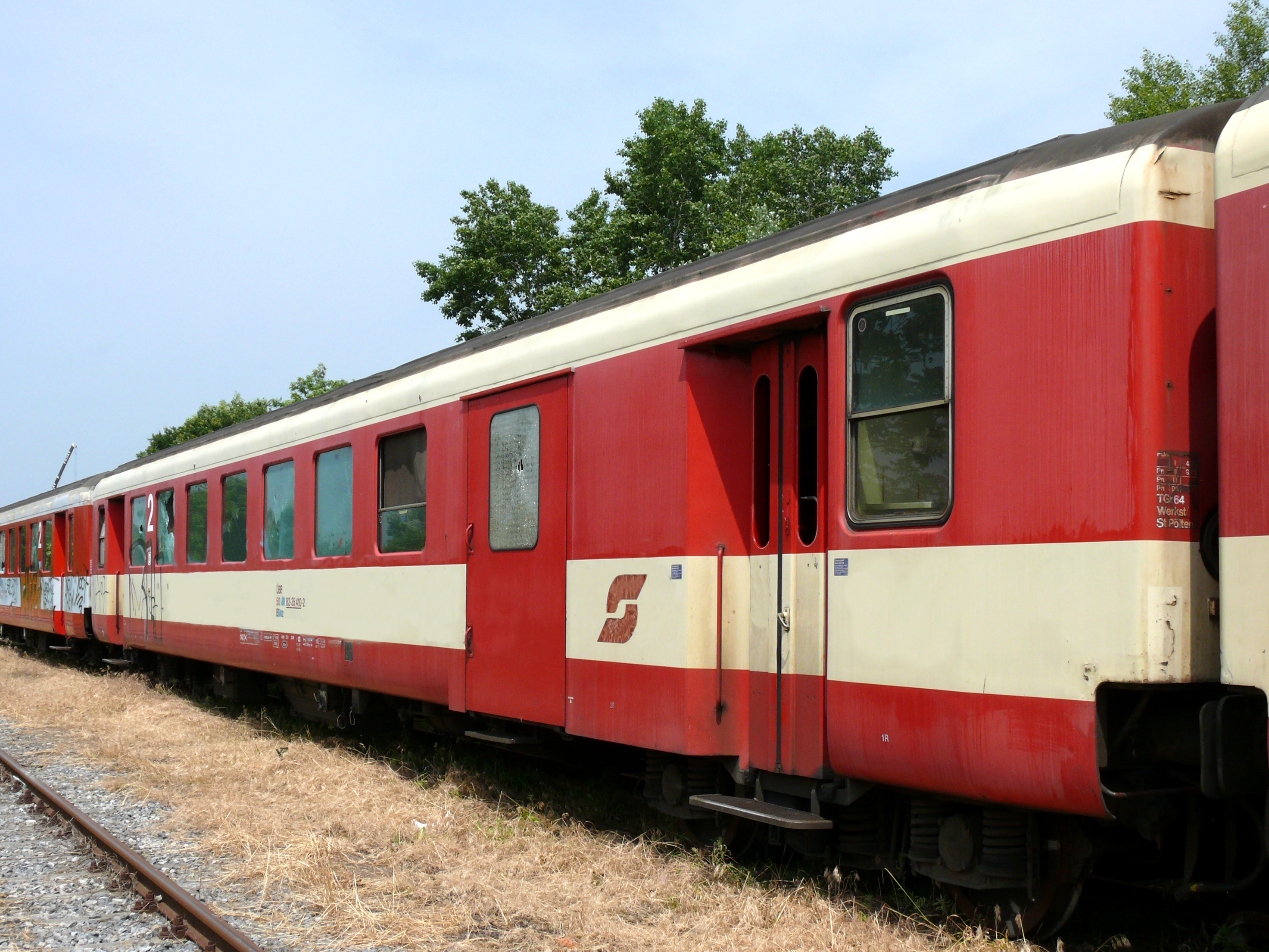 BDpz 82-35 410-2 am Vbf. Breitenlee